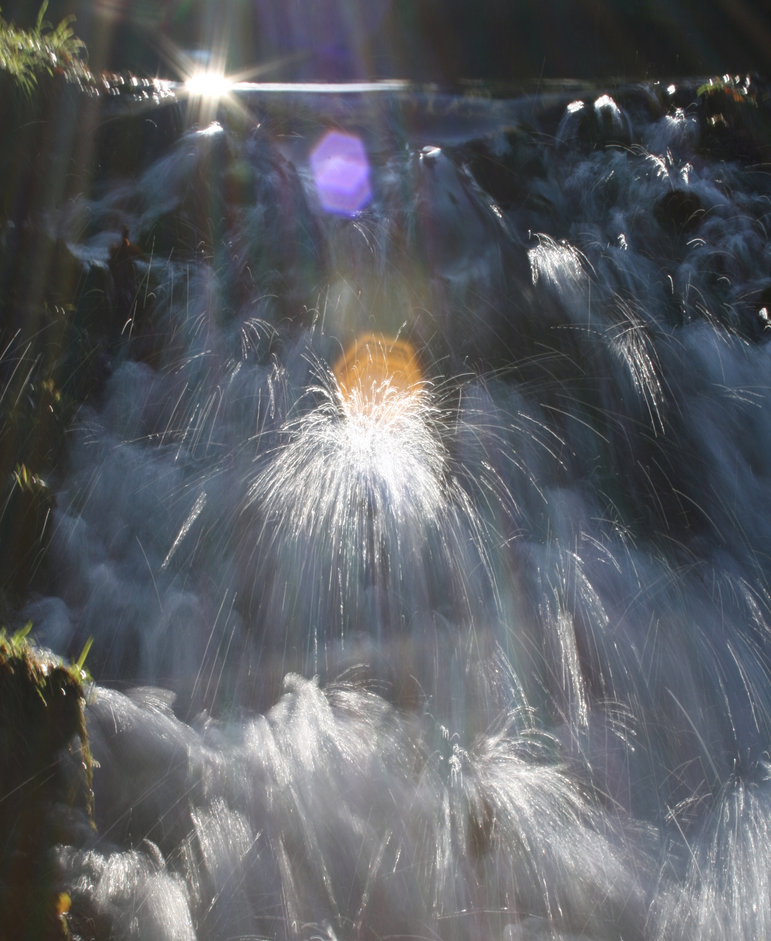 O río Té ao seu paso pola Castiñeiriña, en Rianxo.